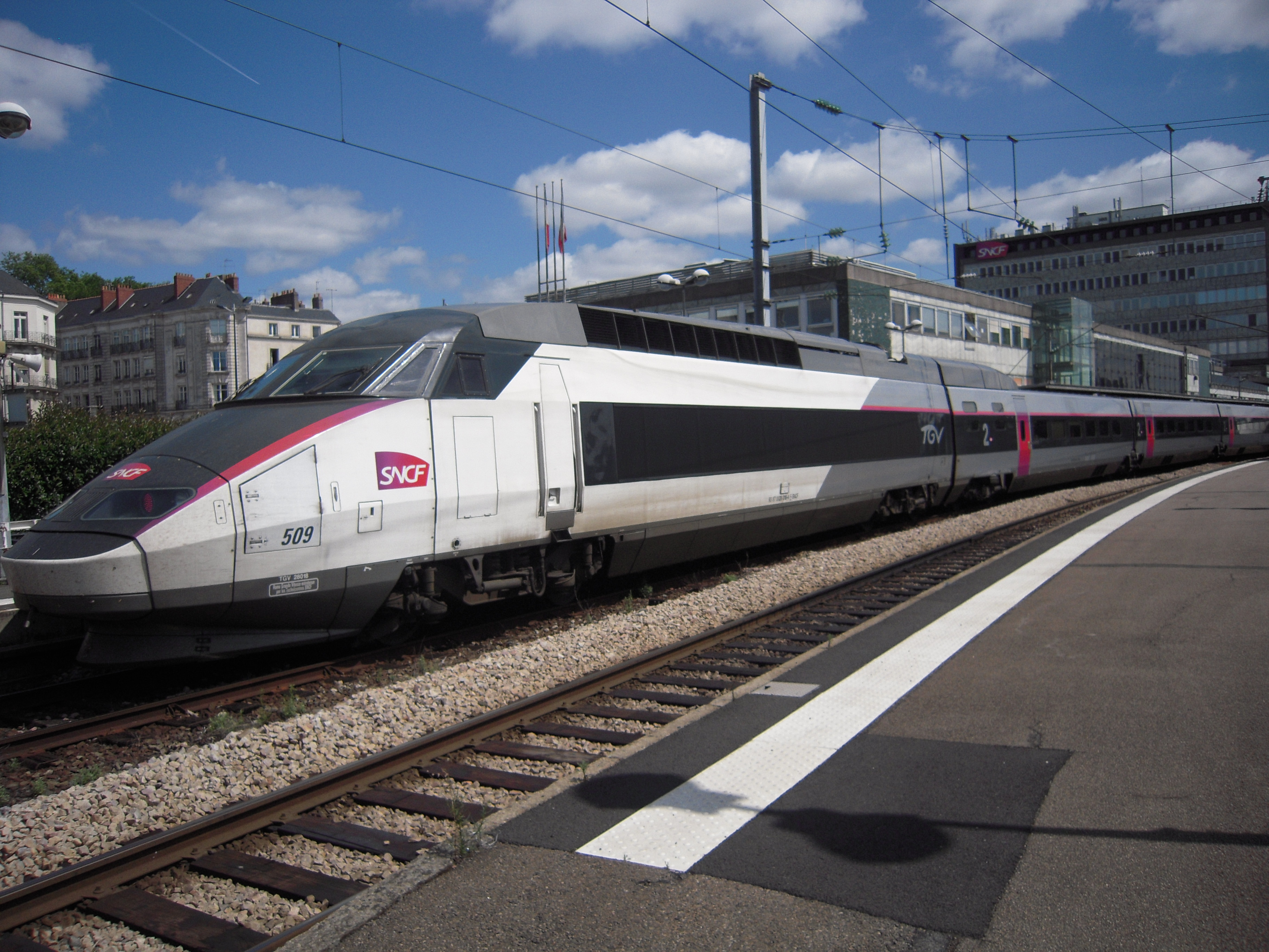 La motrice est blanche à face noire. La rame est gris foncé au niveau des baies et gris métallisé ailleurs. Un filet carmillon court le long de la rame au-dessus des baies et les portes sont de la même teinte, montrant un dégradé du carmin au vermillon (carmillon résulte de la contraction des deux teintes).